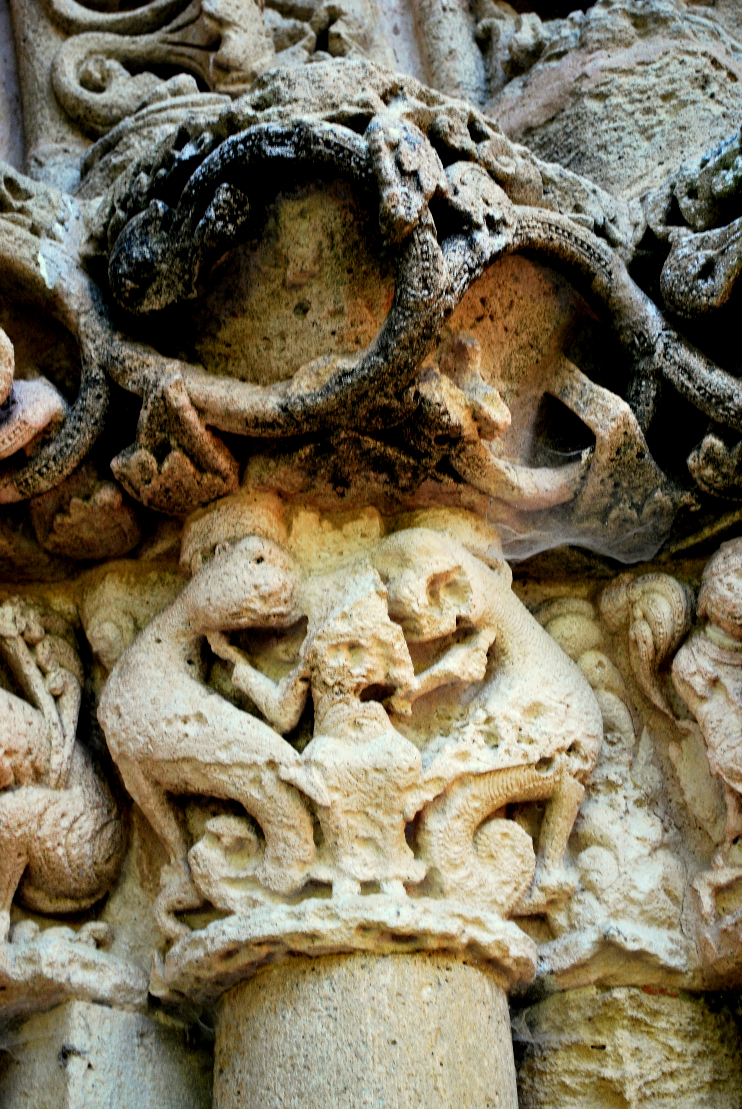 Blasimon église St Nicolas portail